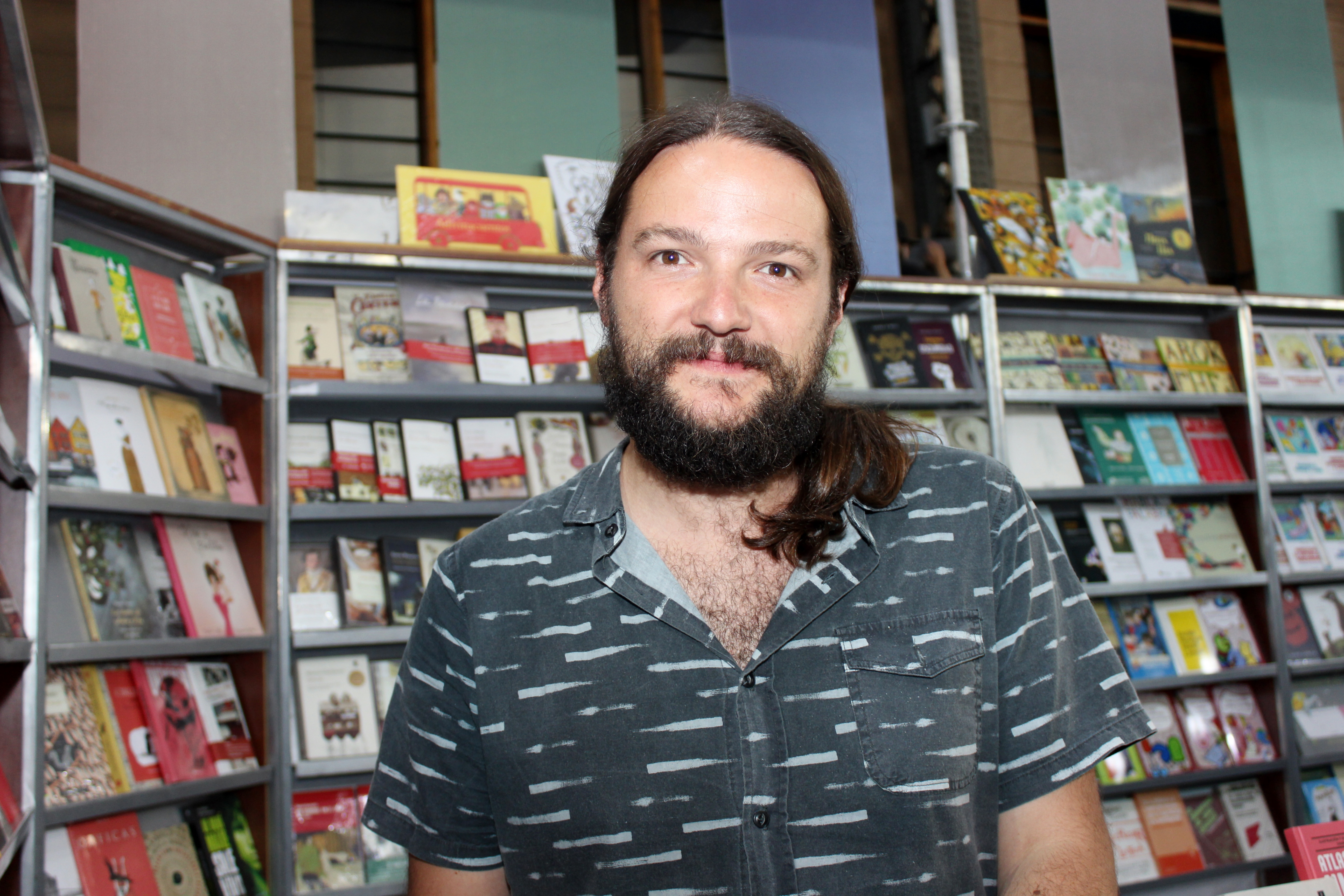 El cantautor chileno Nano Stern en la Feria Internacional del Libro de Santiago 2018.